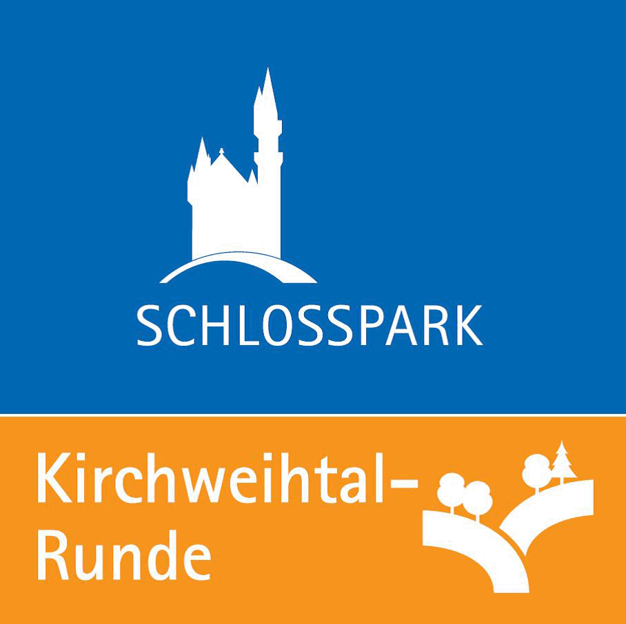 Logo Kirchweihtal-Runde